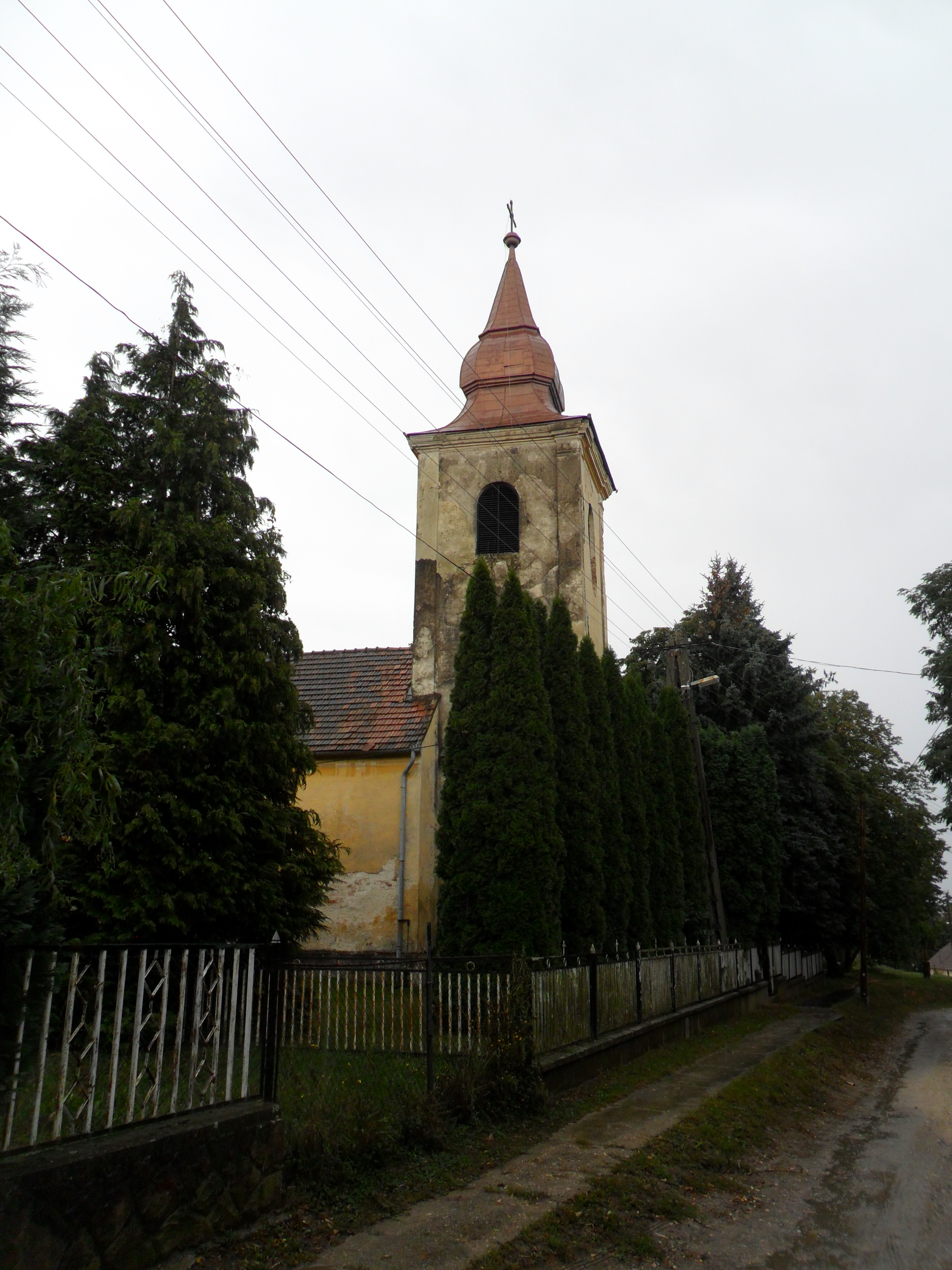 Zalaboldogfai Keresztelő Szent János templom. Boldogfai Farkas Ferenc (1713–1771) zalai alispán felújította és bővítette